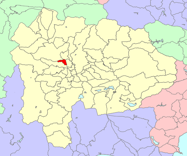 山梨県中巨摩郡八田村の位置画像。